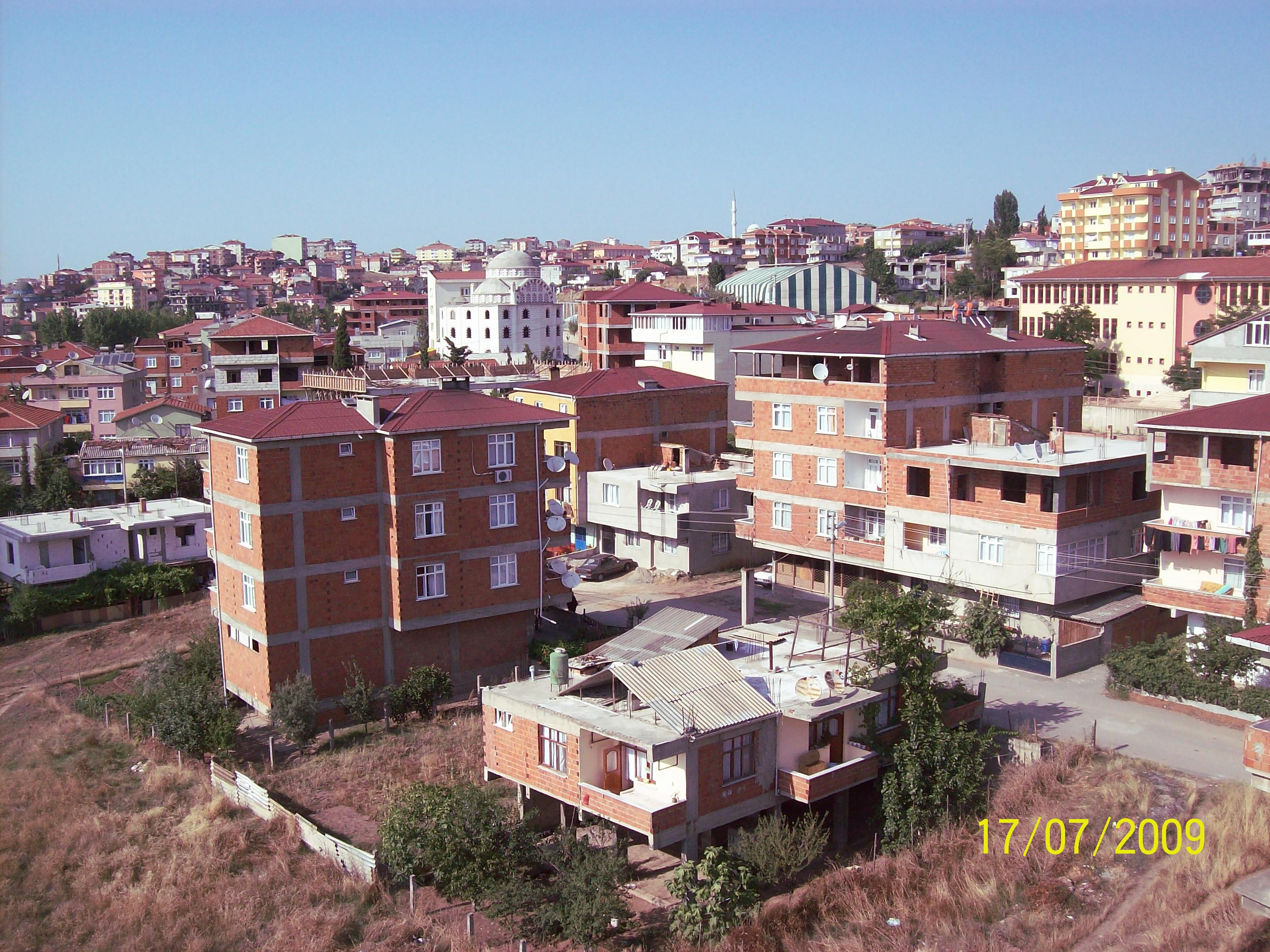 Adem Yavuz Mh. ve İlköğretim Okulu